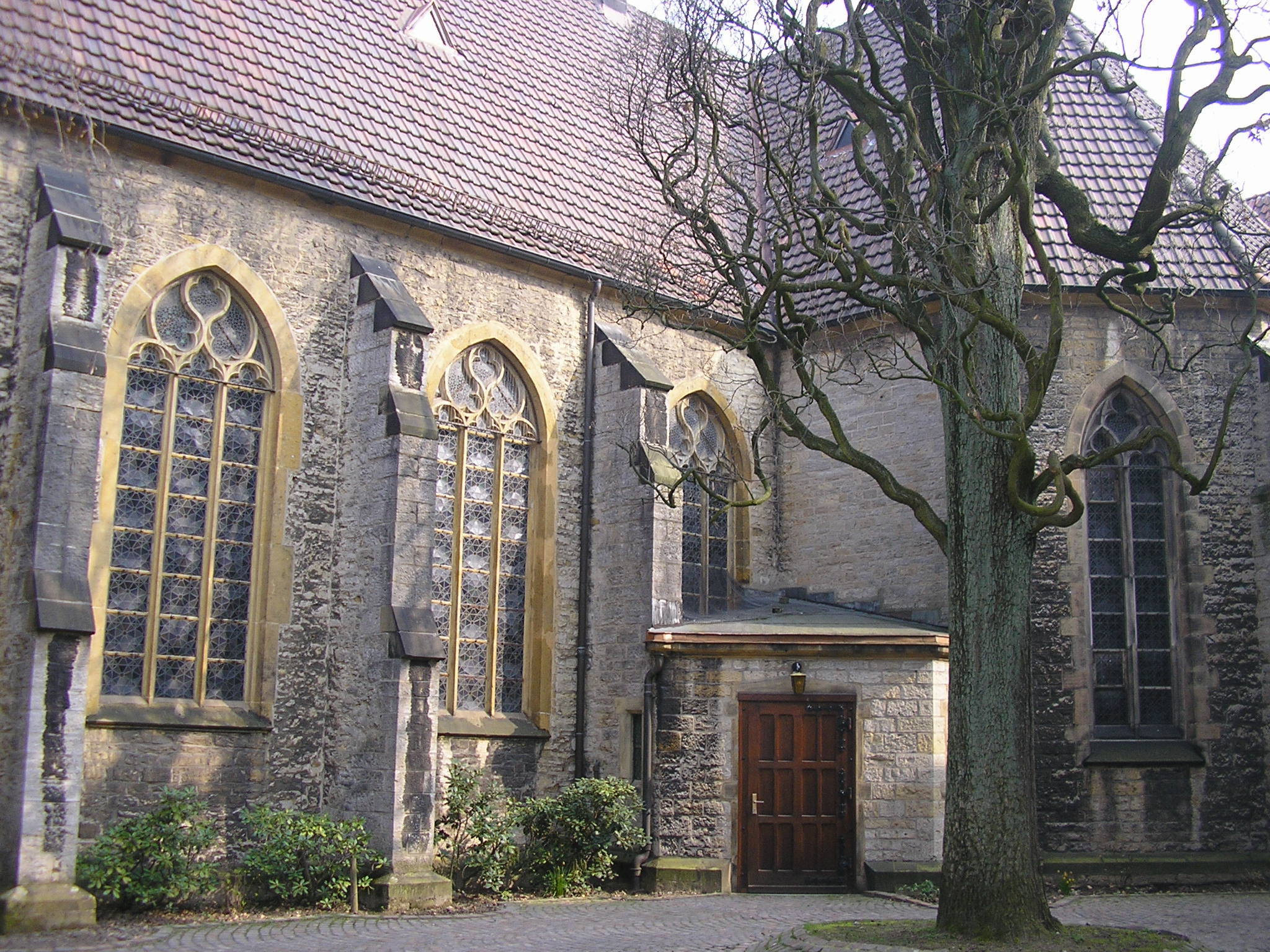 Süsterkirche (Bielefeld)